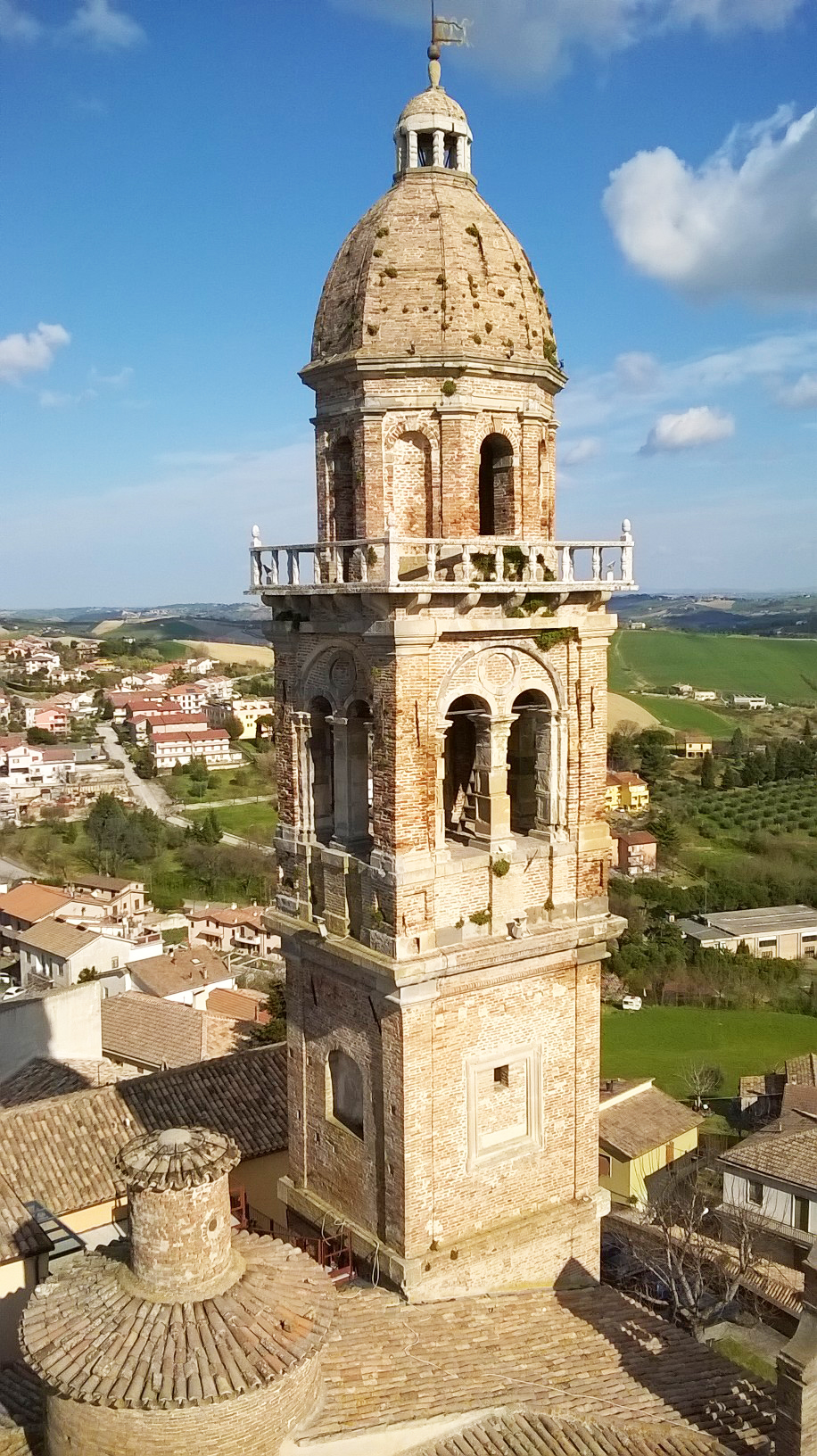 Torre Malatestiana di Orciano di Pesaro, Terre Roveresche, PU, Marche. Vista dalla prospiciente torre civica campanaria.